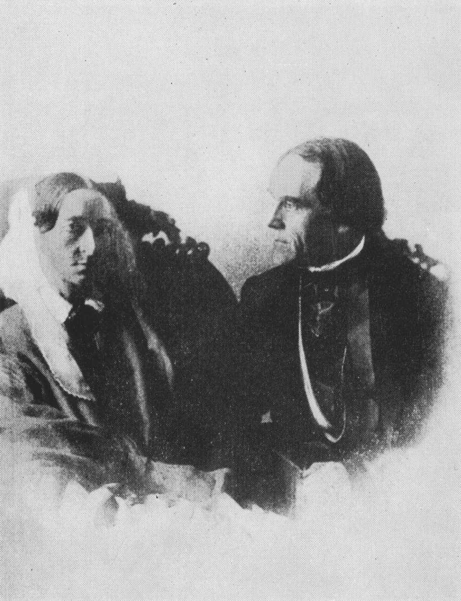 Therese Staufenau geb. Gauß mit ihrem Mann Constantin Staufenau. In einem Brief an Christian Ludwig Gerling schrieb Constantin Staufenau 1863: "Sie erhalten hier ein Bildchen Theresens; sie entschloß sich zur Sitzung vergangenen Sommer bei schon schweren Leiden, um mir ein sichtbares Andenken von sich zu hinterlassen. Da der photographische Apparat nach unserm Hause gebracht werden mußte, so ist die Beleuchtung nicht günstig gewesen, dürfte Ihnen aber doch, bei ziemlicher Ähnlichkeit, so wie es ist, lieb sein. Die freundliche Güte, welche Sie mir seit unserer Vereinigung entgegengebracht haben, läßt mich hoffen, daß Sie auch meinem Abbild ein Plätzchen in Ihrem Album neben meiner Teuersten gewähren werden." (Brief von Constantin Wilhelm Staufenau an Christian Ludwig Gerling, 1. Dezember 1863, Handschrift: Göttingen, SUB, Gauß, Briefe D: Therese Gauß 28)